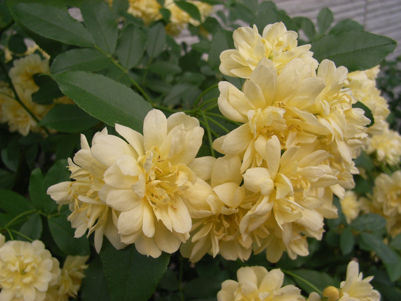 モッコウバラ